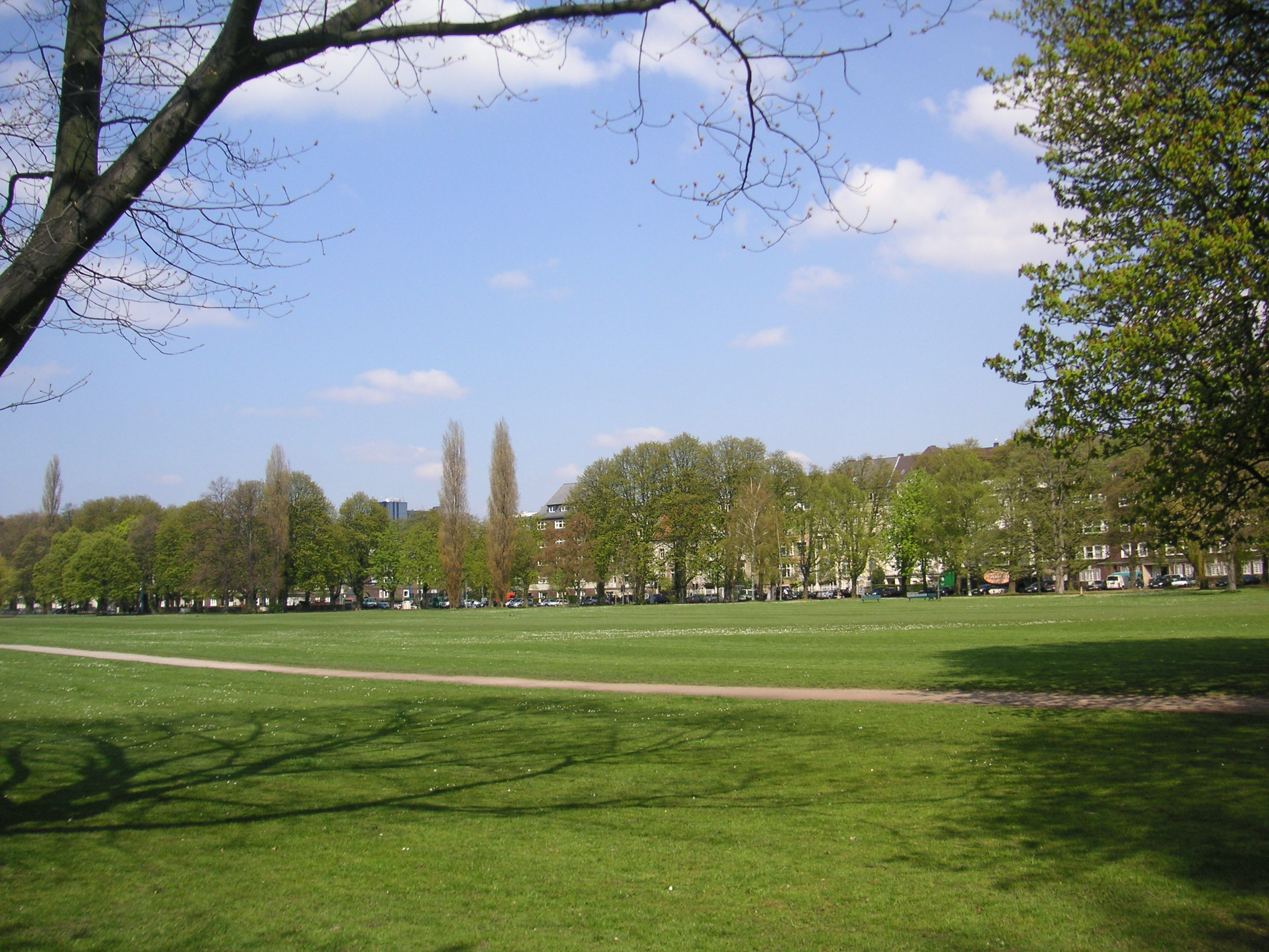 Rheinpark in Düsseldorf-Golzheim, Blick auf die Cecilienallee